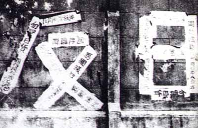 1931年，上海街头照片。 超过70年，应该已过保护期了。--列那狐 (留言) 14:08 2005年5月17日 (UTC)